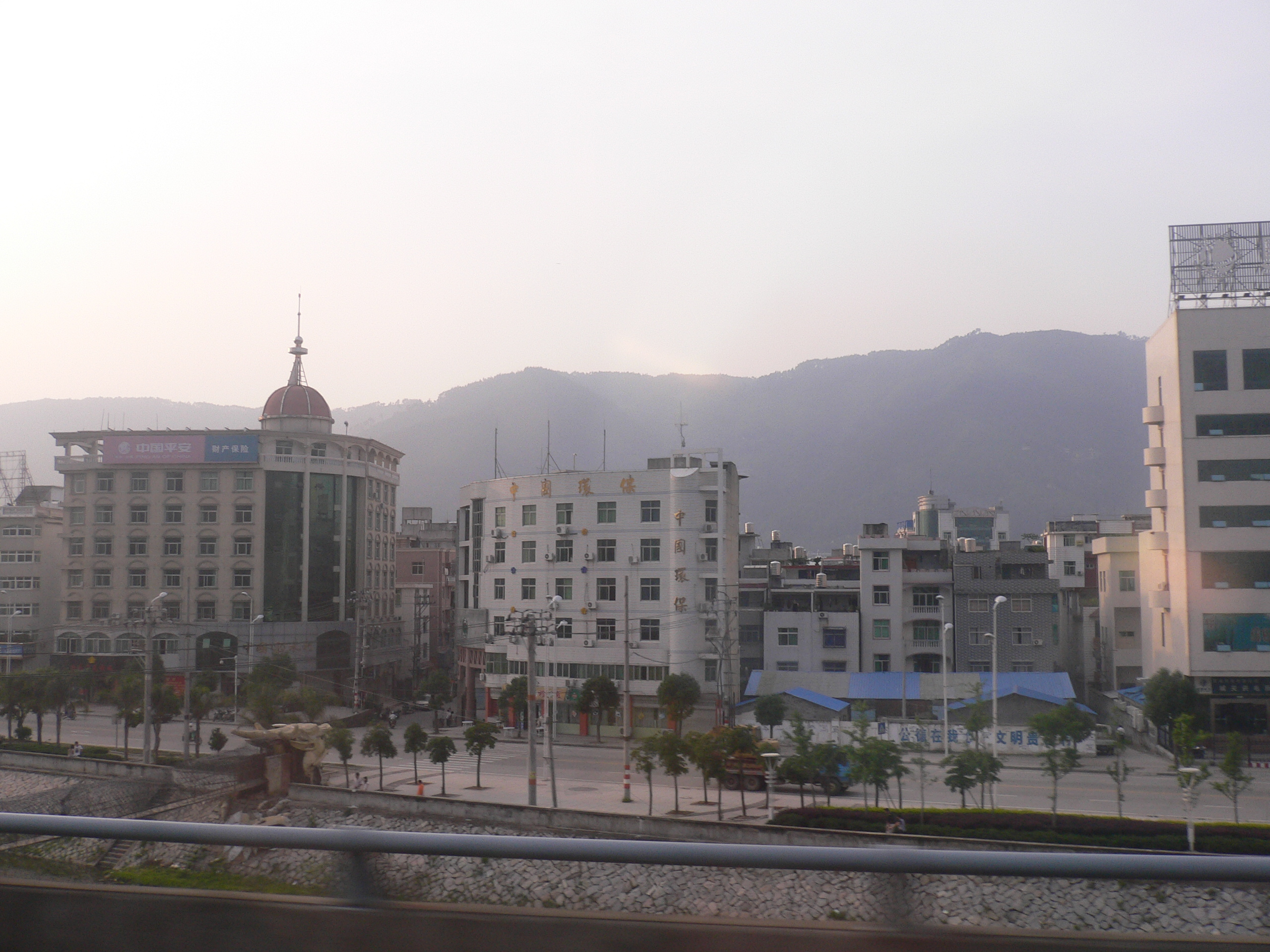 高速公路上拍霞浦街景3